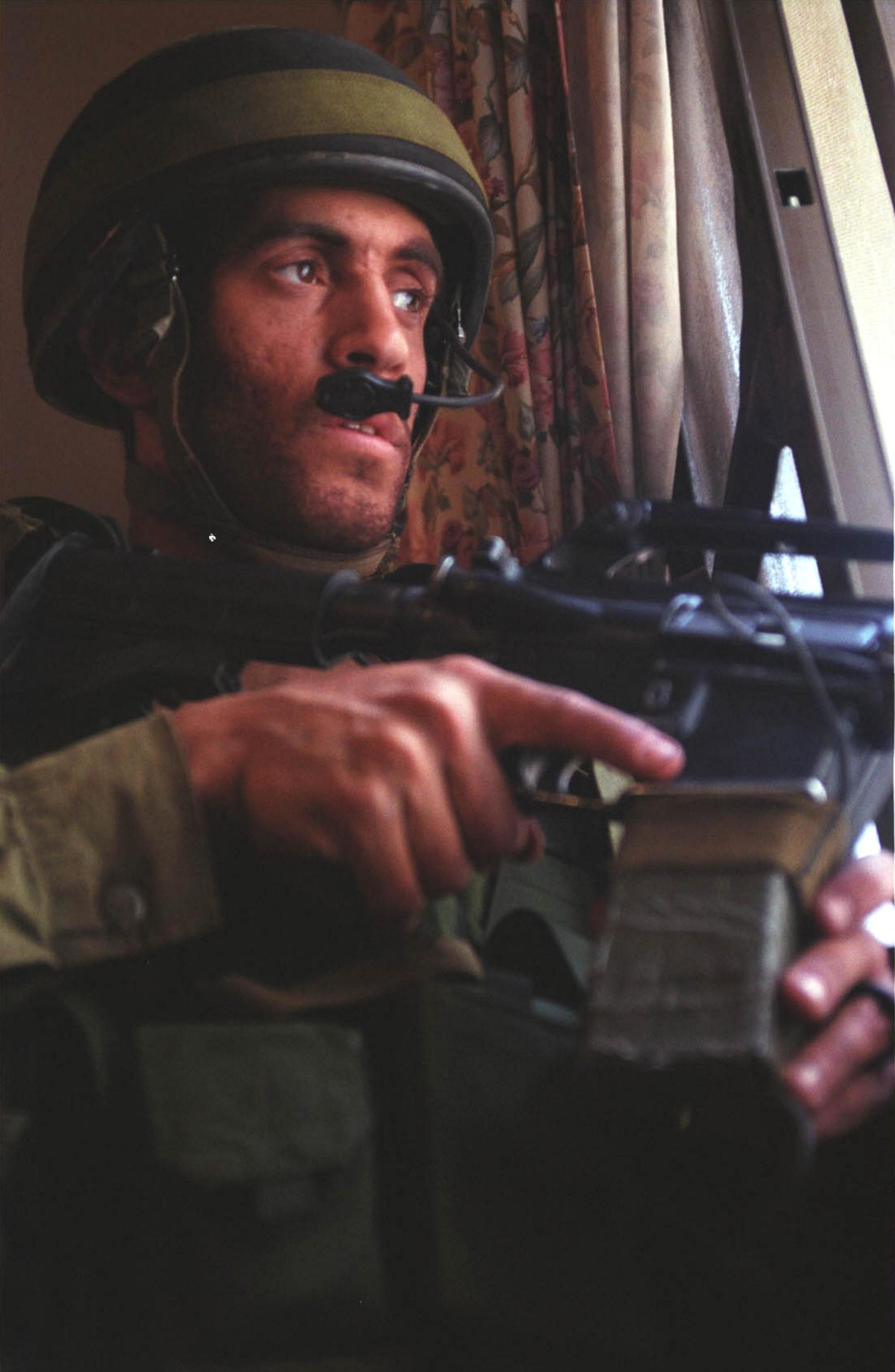 מבצע "חומת מגן" להריסת תשתיות הטרור ברשות הפלשתינית על ידי כוחות צה"ל. בצילום, חייל צה"ל עם נשקו מתבונן מפתח חלון, דרוך לקראת הבאות, בבית לחם.